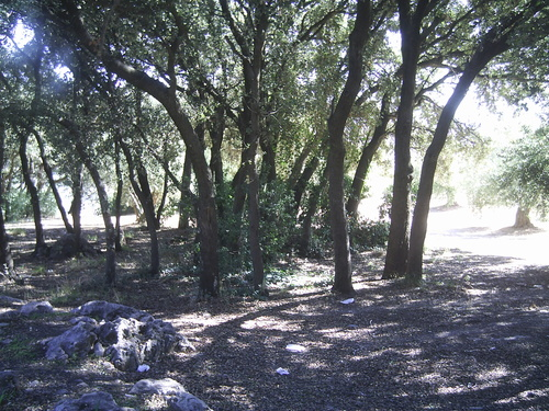 Bosque de La Bañizuela (Torredelcampo, Jaén)